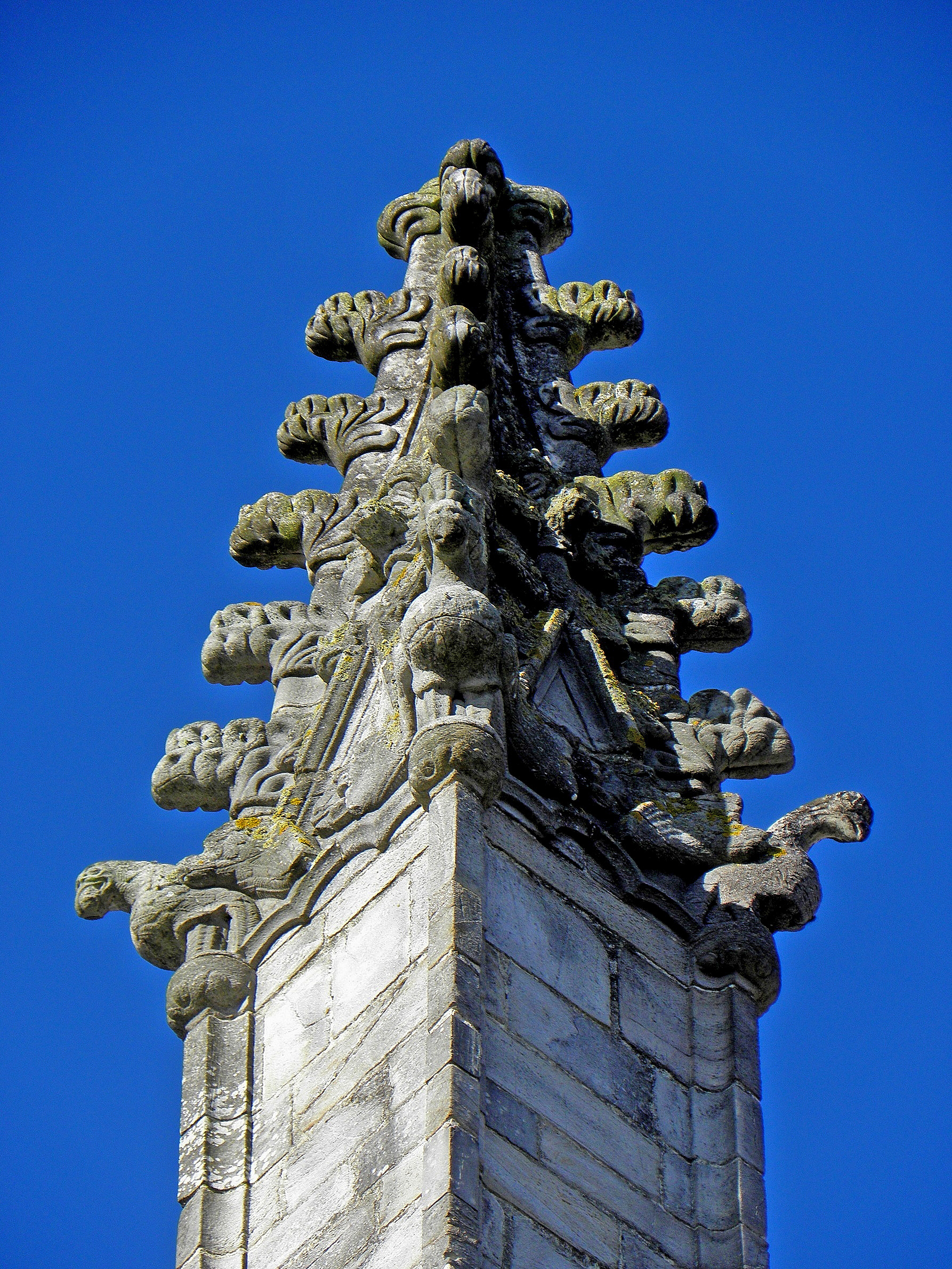 Façade ouest de l'église Notre-Dame de Vitré (35). Pinacles.